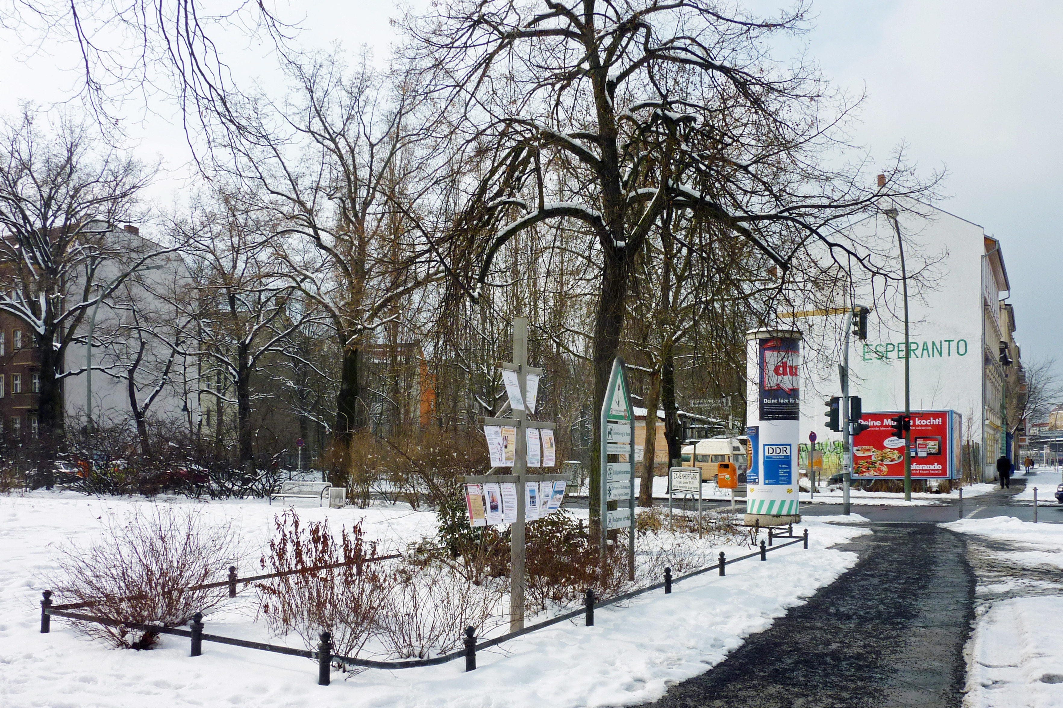 Zamenhofpark Seite Einbecker Straße in Berlin-Friedrichsfelde.